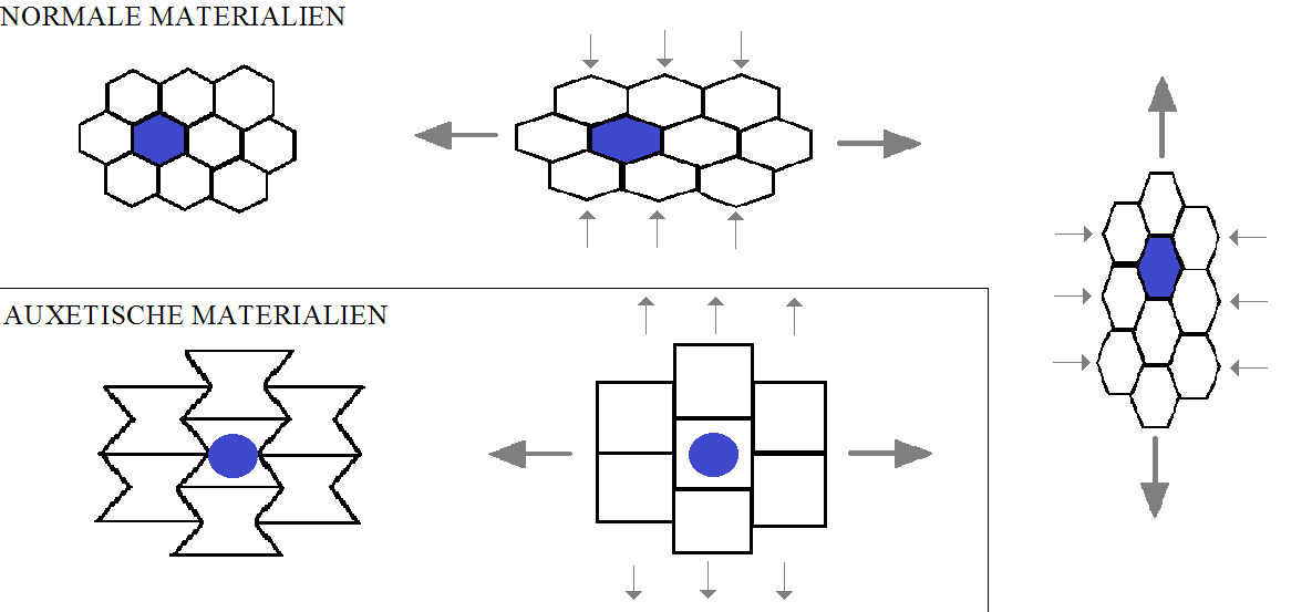 Aufbau von normalen Materialien und auxetischen Materialien